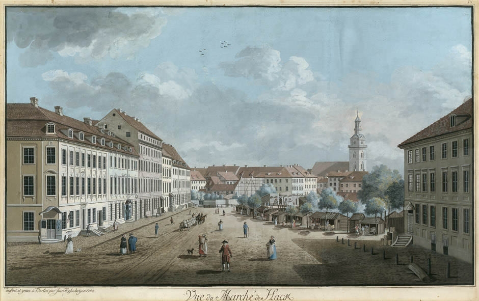 Vue de Marché de Hack (prise de la Rue d'Orangebourg, avec le Pont de Spandau, et l'Eglise Ste Marie dans l'éloignement. Radierung, koloriert, 44 x 69,5 cm. Dessiné et grave à Berlin par Jean Rosenberg, en 1780.